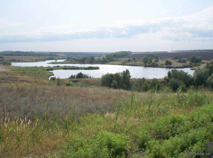 Хутор Нижнежуравский Ростовской области